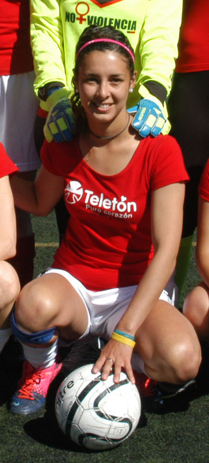 Romina Parraguirre, guardameta de la selección de fútbol femenino de Chile, en un evento de Teletón Chile.